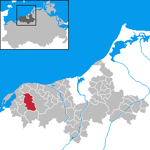 Biendorf in Mecklenburg-Western Pomerania - District Bad Doberan